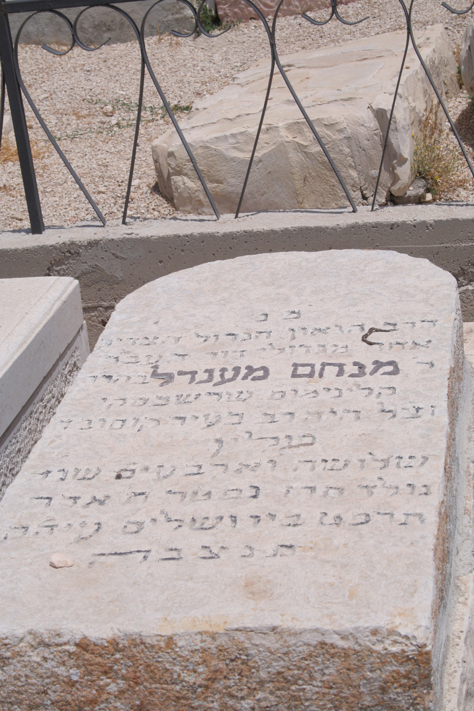 הקבר בגוש הנביאים, חלקה ז'